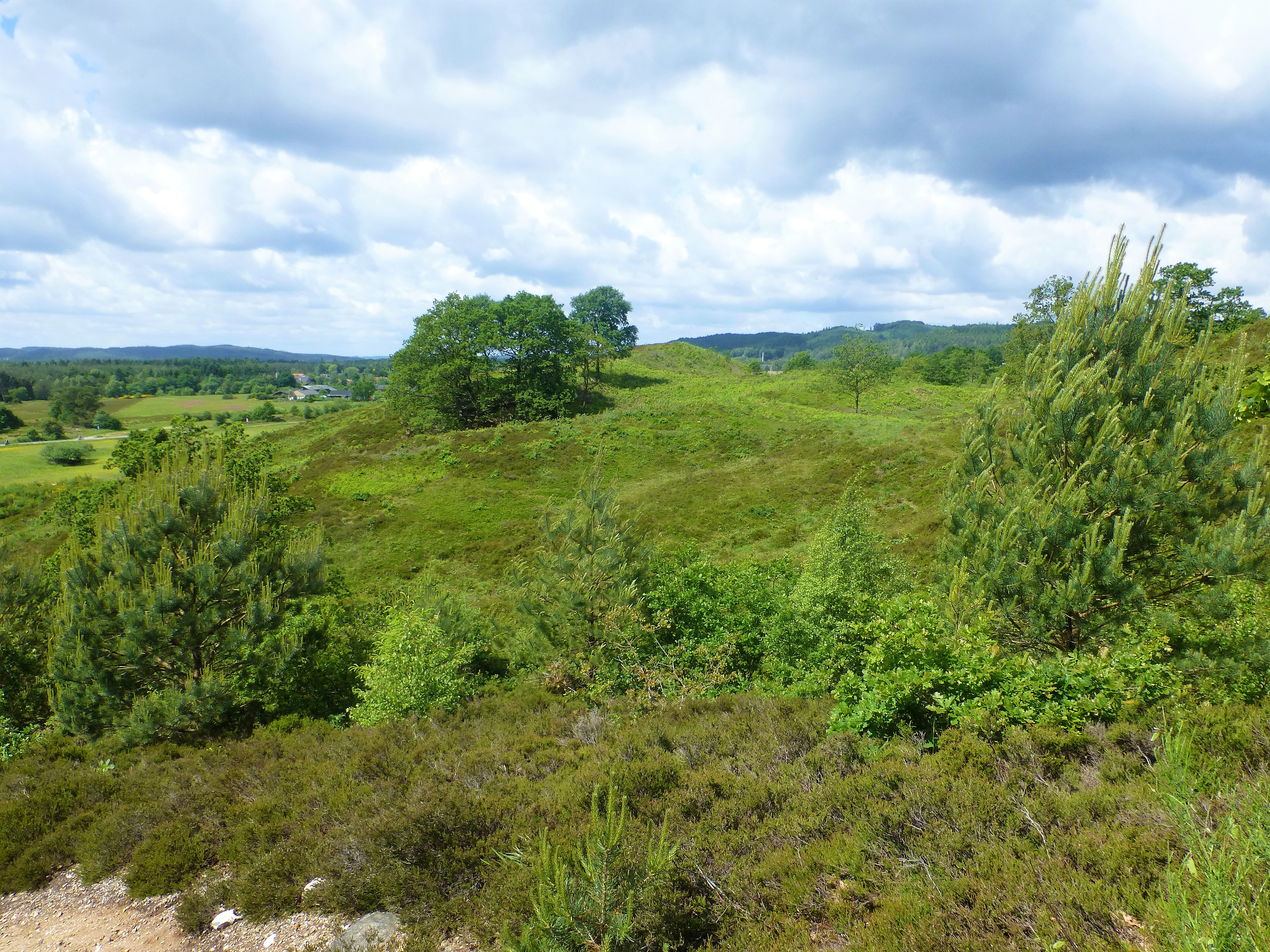 Lyngbakkerne ved Gammel Rye set mod vest